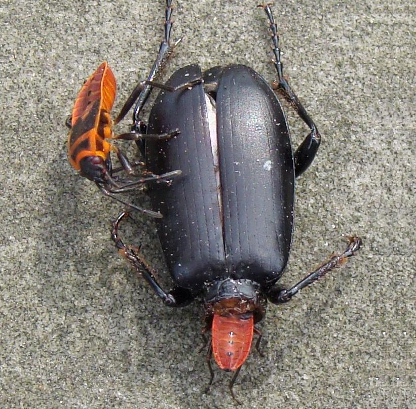 Kowal bezskrzydły Pyrrhocoris apterus - odżywianie